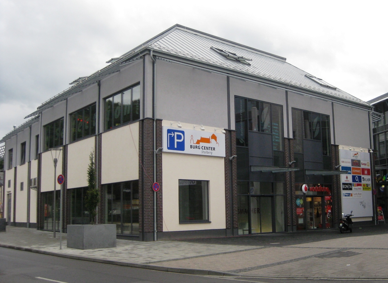 BurgCenter in Oberstolberg (Stolberg